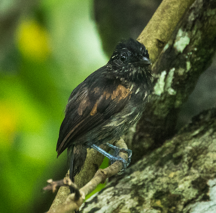 Black Antshrike - Darien - Panama CD5A9801